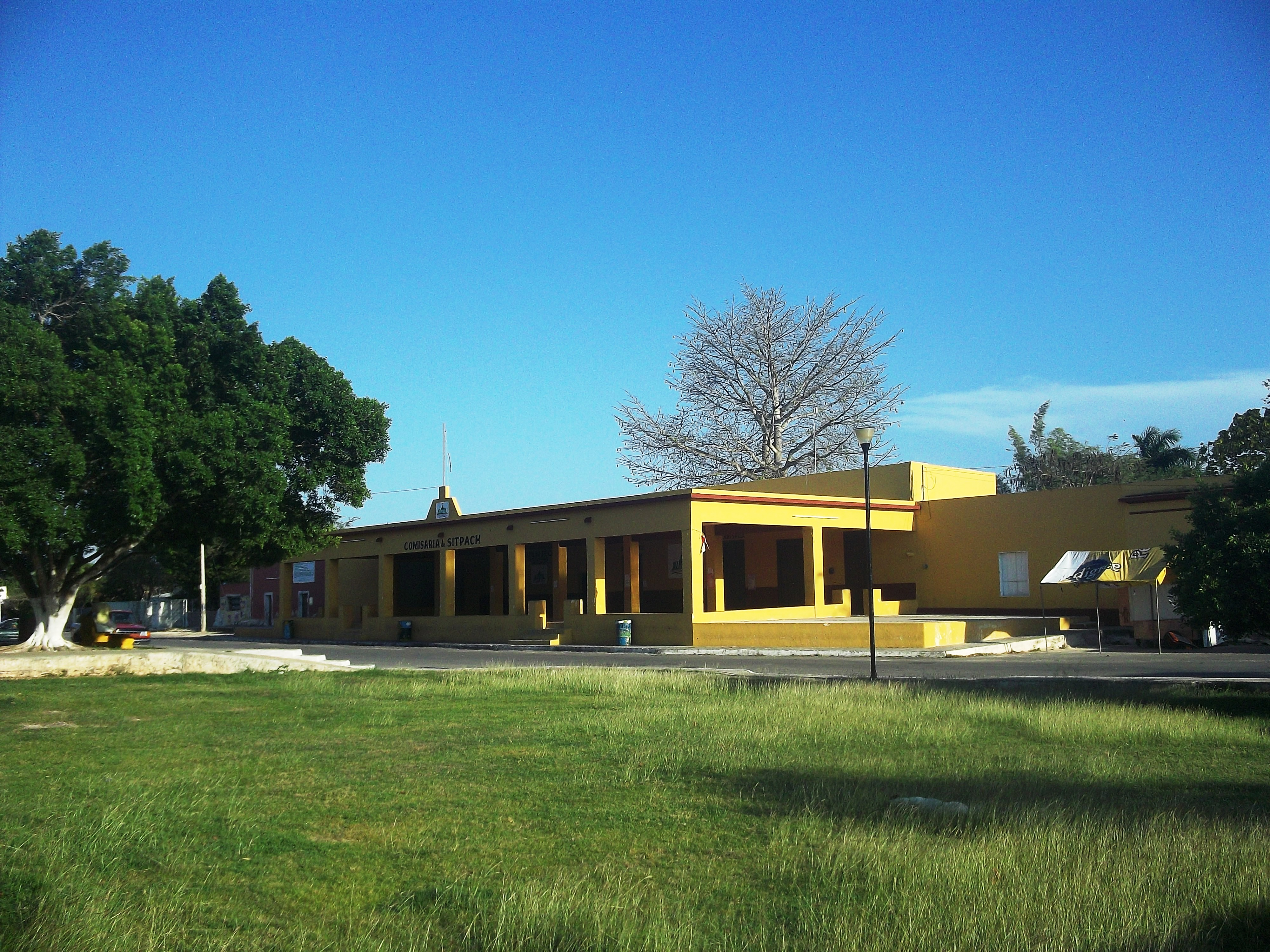 Casa comisarial de Sitpach (Municipio de Mérida), Yucatán.